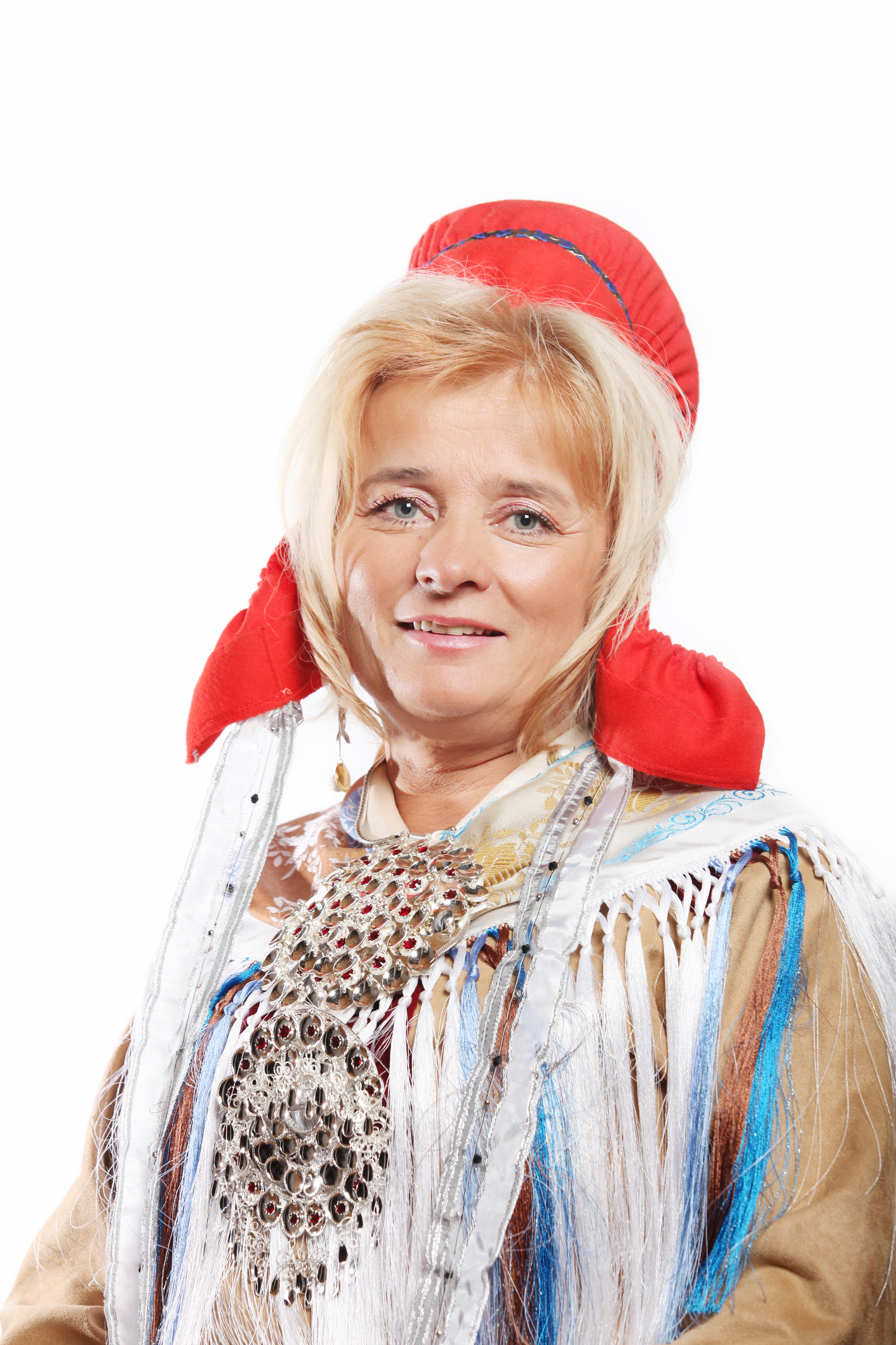 Nestleder av valgkomitéen og medlem av næring- og kulturkomitéen. Foto: Kenneth Hætta / Sametinget.